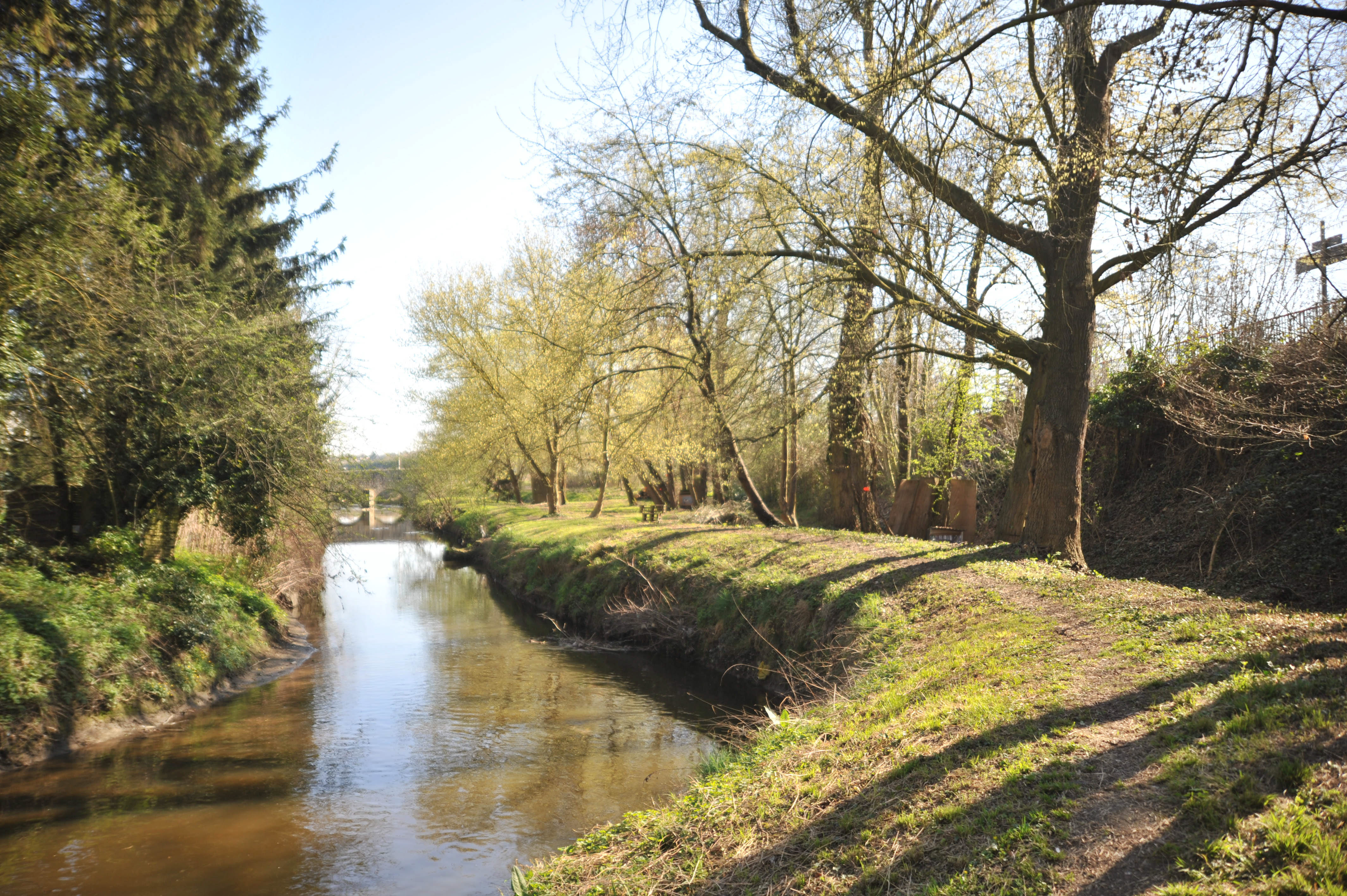 Longjumeau